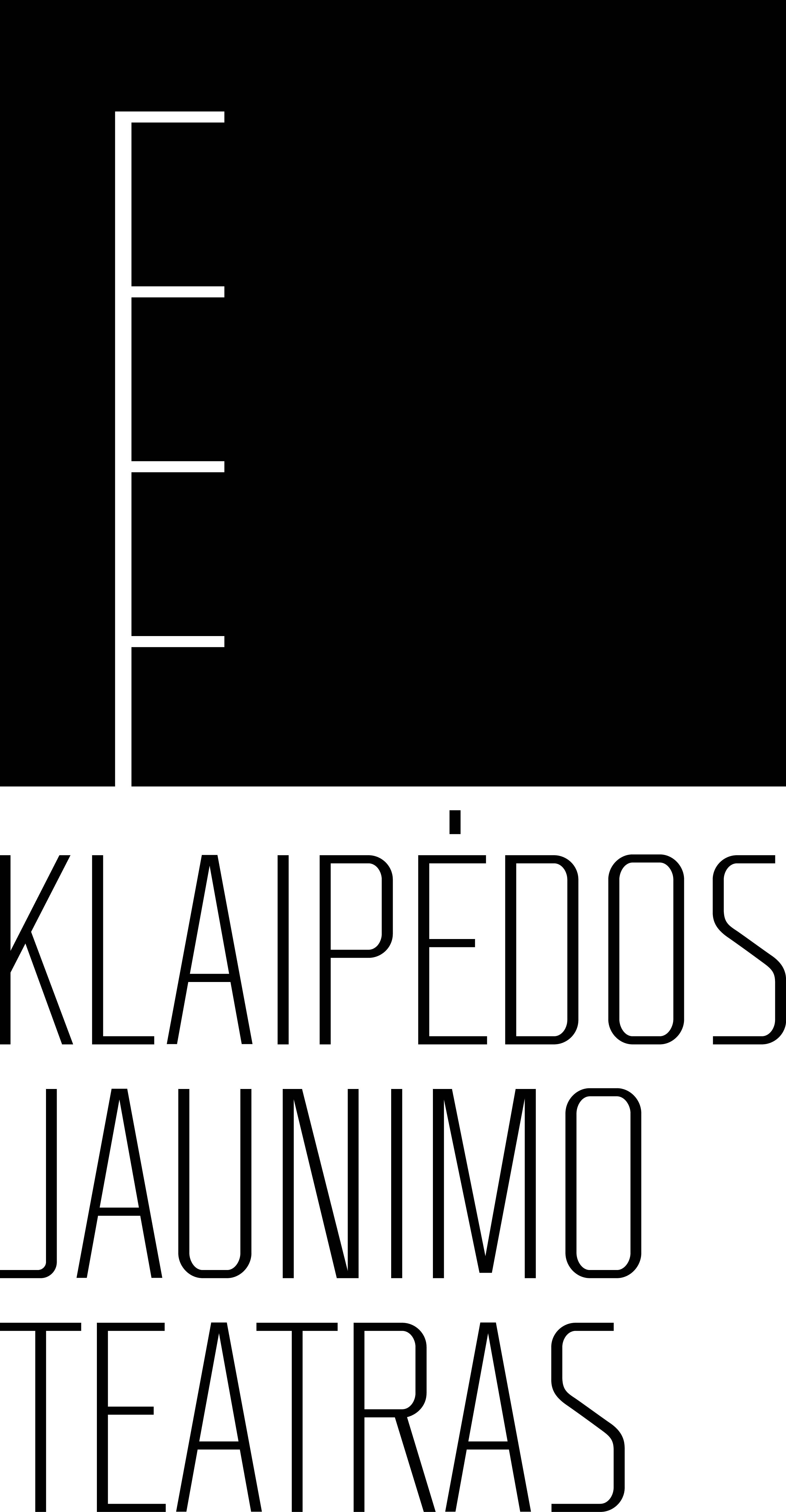 Klaipėdos jaunimo teatro logotipas